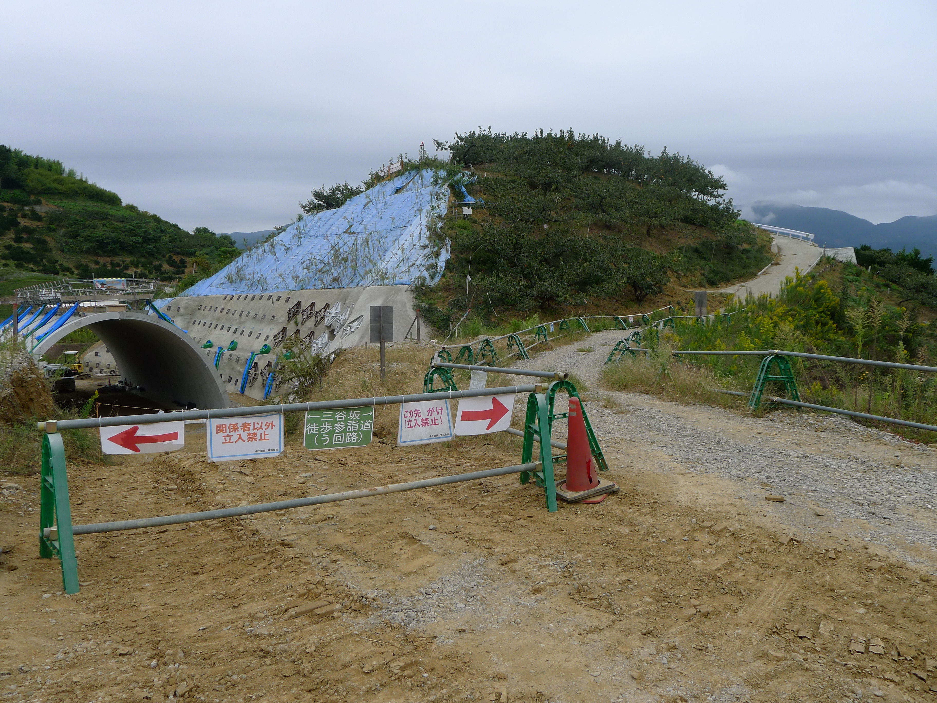 2016年に世界遺産「紀伊山地の霊場と参詣道」に「高野参詣道」として追加登録された三谷坂で行われている道路(ﾄﾝﾈﾙ)新設工事、これにより三谷坂古道の一部が破壊され永久に失われた